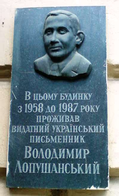 Мемориальная доска украинского писателя Владимира Николаевича Лопушанского (1903-1987) во Львове по ул. Лычаковская, 77